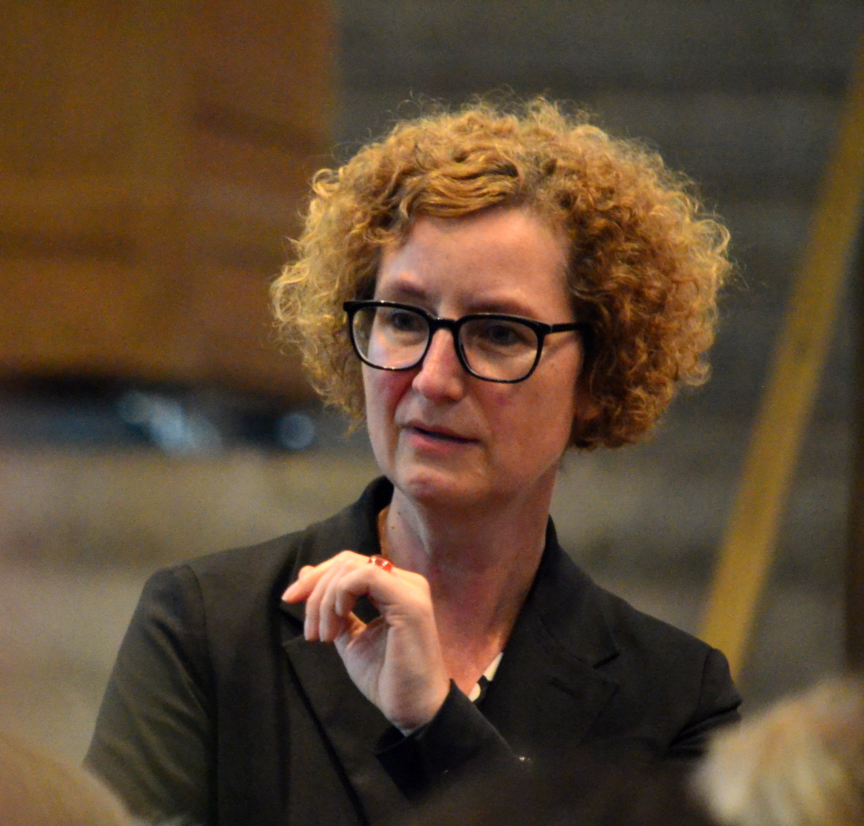 Heike Pöppelmann, Direktorin des Braunschweigischen Landesmuseums.